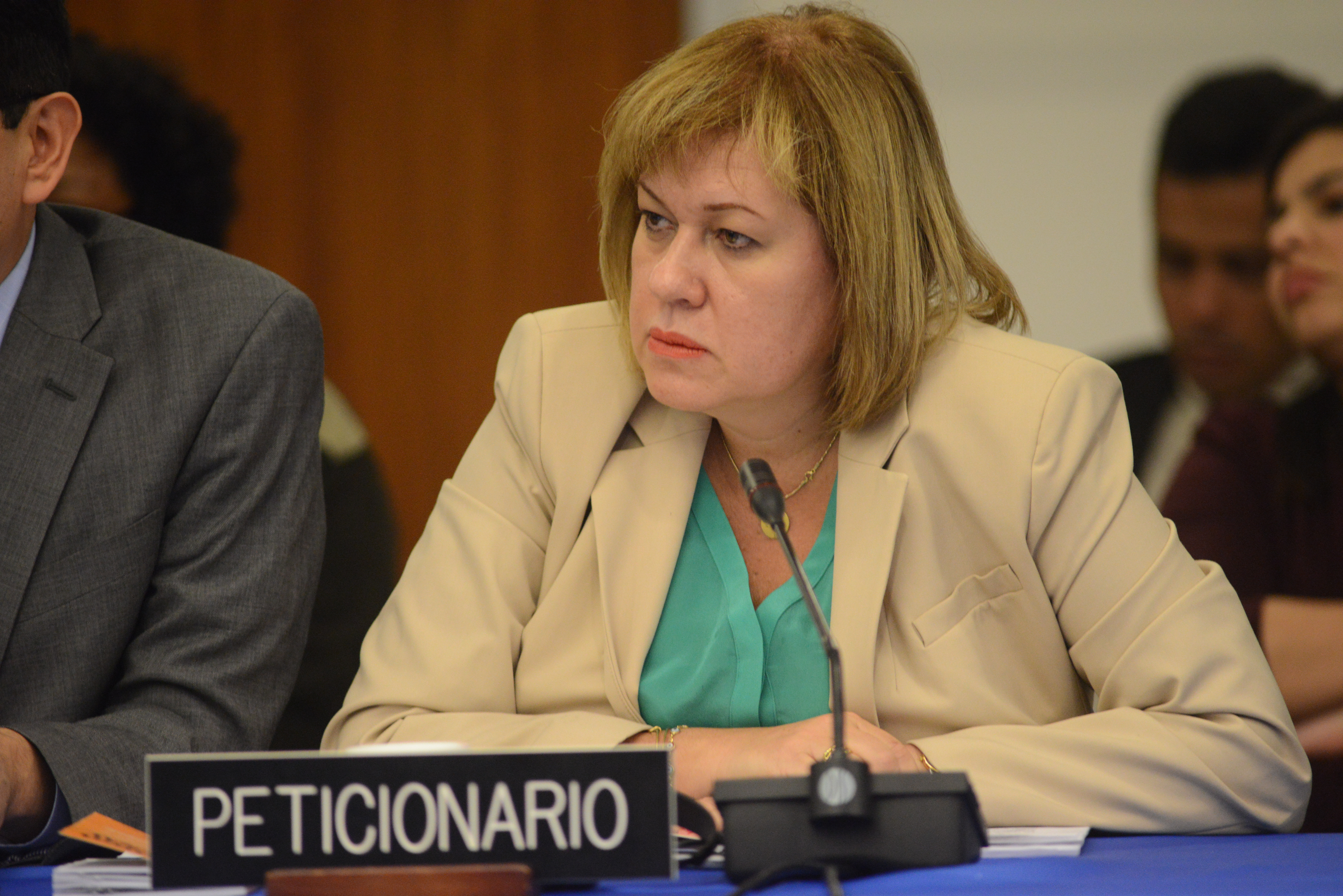 Peticionaria de la audiencia Liliana Ortega (COFAVIC) en el 154 Período Ordinario de Sesiones de la Comisión Interamericana de Derechos Humanos.